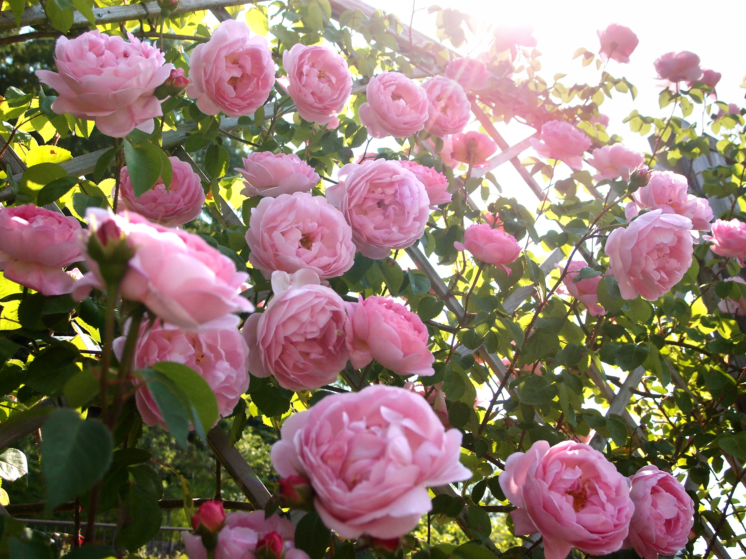 Rose Constance Spry バラ コンスタンス スプライ Shrub rose シュラブ United Kingdom イギリス Austin 1961